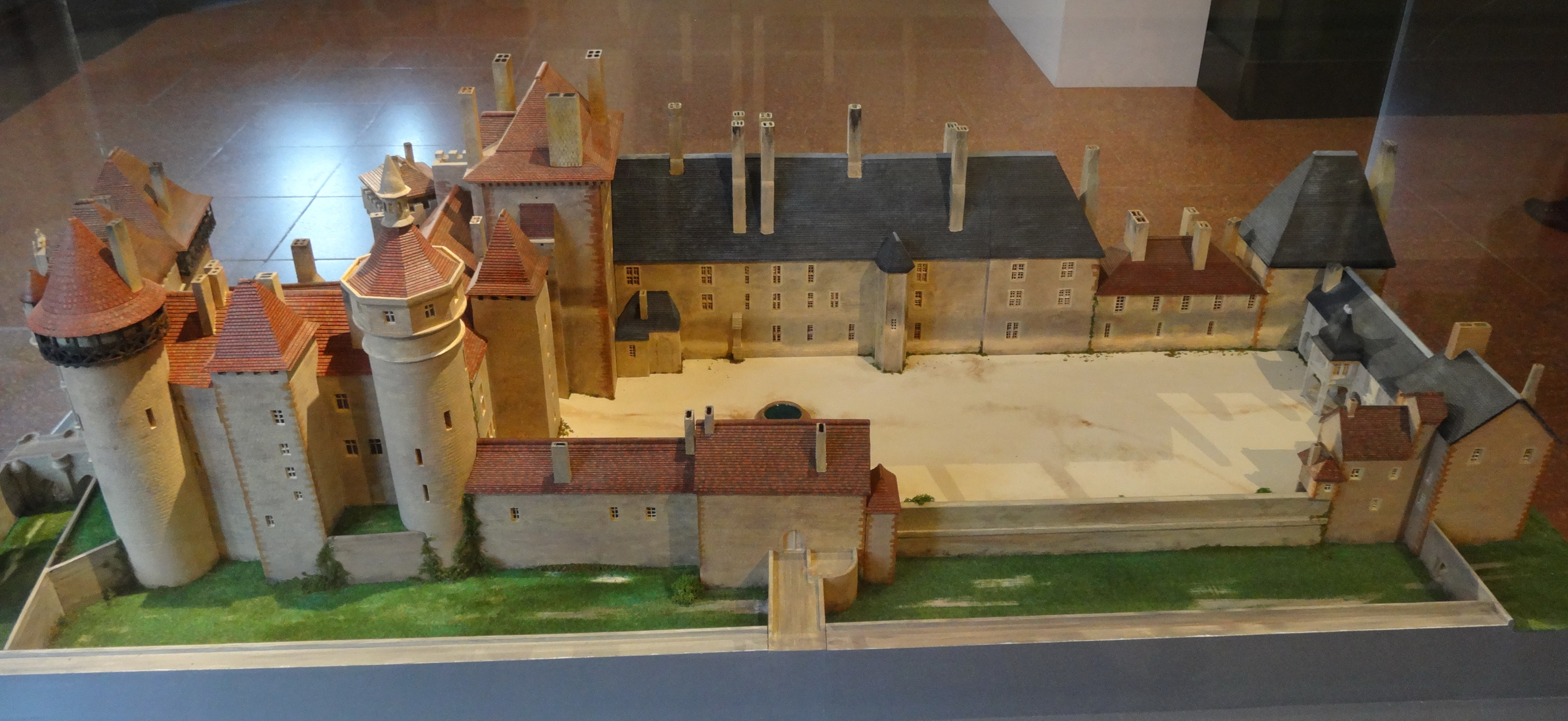 В наше время сохранились Сторожевая башня (высокая четырёхугольная башня в центре макета) и Павильон Анны де Божё (крайняя правая часть макета).